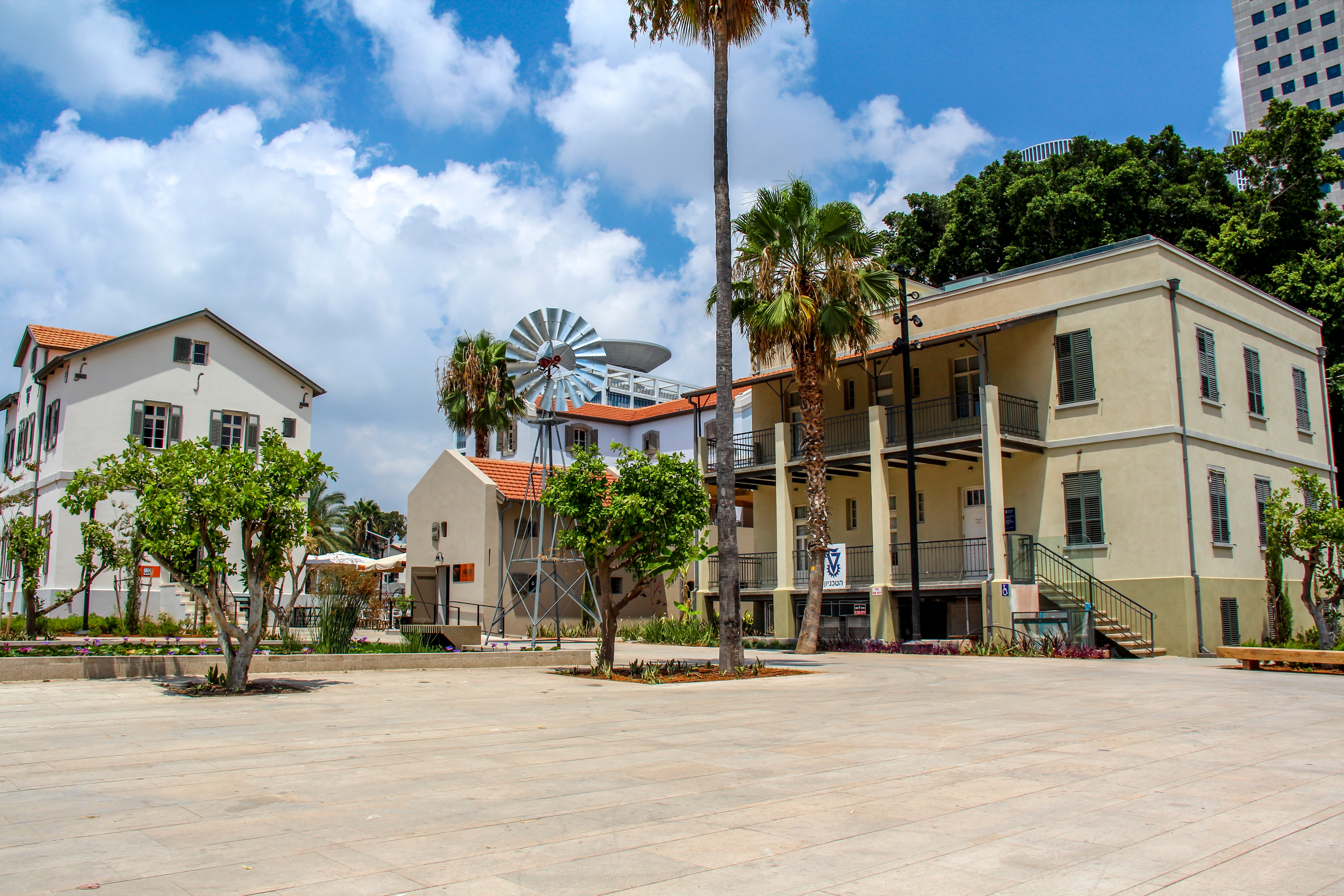 שׂרונה היא המושבה הרביעית שהקימו הגרמנים הטמפלרים בארץ ישראל במחצית השנייה של המאה ה-19. המושבה הוקמה ארבעה קילומטרים צפונית ליפו, ואחרוני בתיה שוכנים כיום בתל אביב בין שדרות שאול המלך מצפון, דרך בגין במזרח, רחוב הארבעה מדרום, ומגרשי החנייה של אחוזות החוף ממערב. מקצתם נמצאים היום בתוך בסיס הקריה.